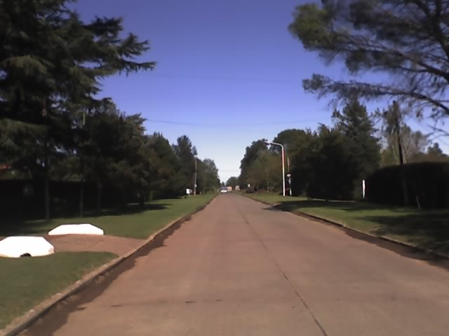 Town of Veinte de Junio, La Matanza Partido, Buenos Aires Province.